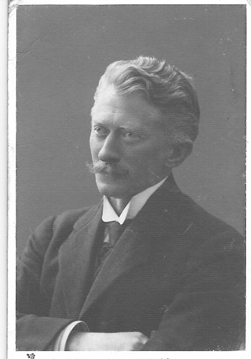 Herman haugerud